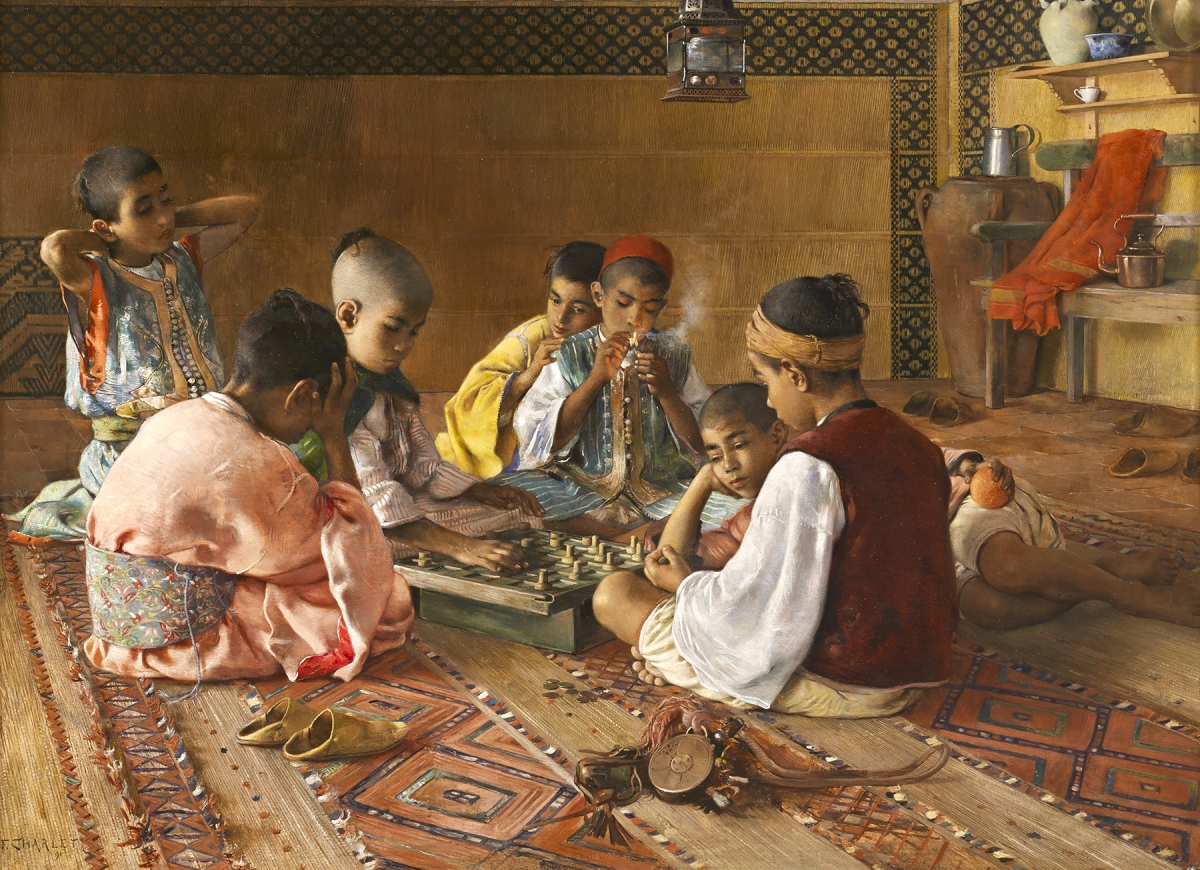 Une partie de dama